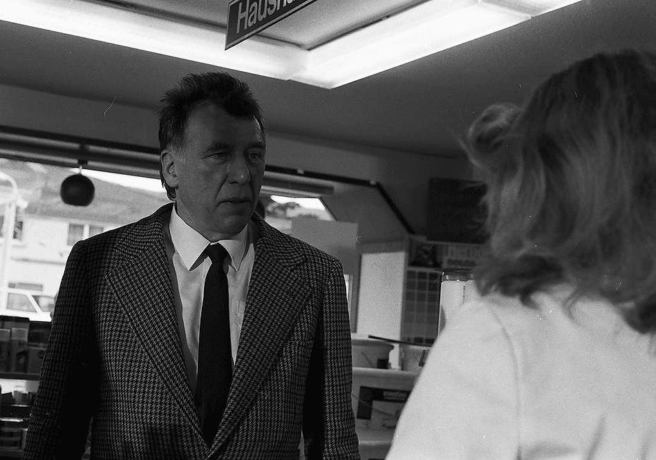 Freiburg im Breisgau: Dreharbeiten für eine TV-Serie in einer Drogerie in St. Georgen. Hubert Suschka